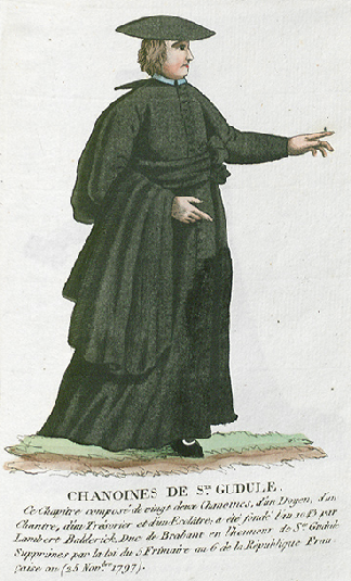 Collection de costumes de tous les ordres monastiques, supprimés à differentes époques, dans la ci-devant Belgique, Bruxelles, Philippe Joseph Maillart et sœur, 1811